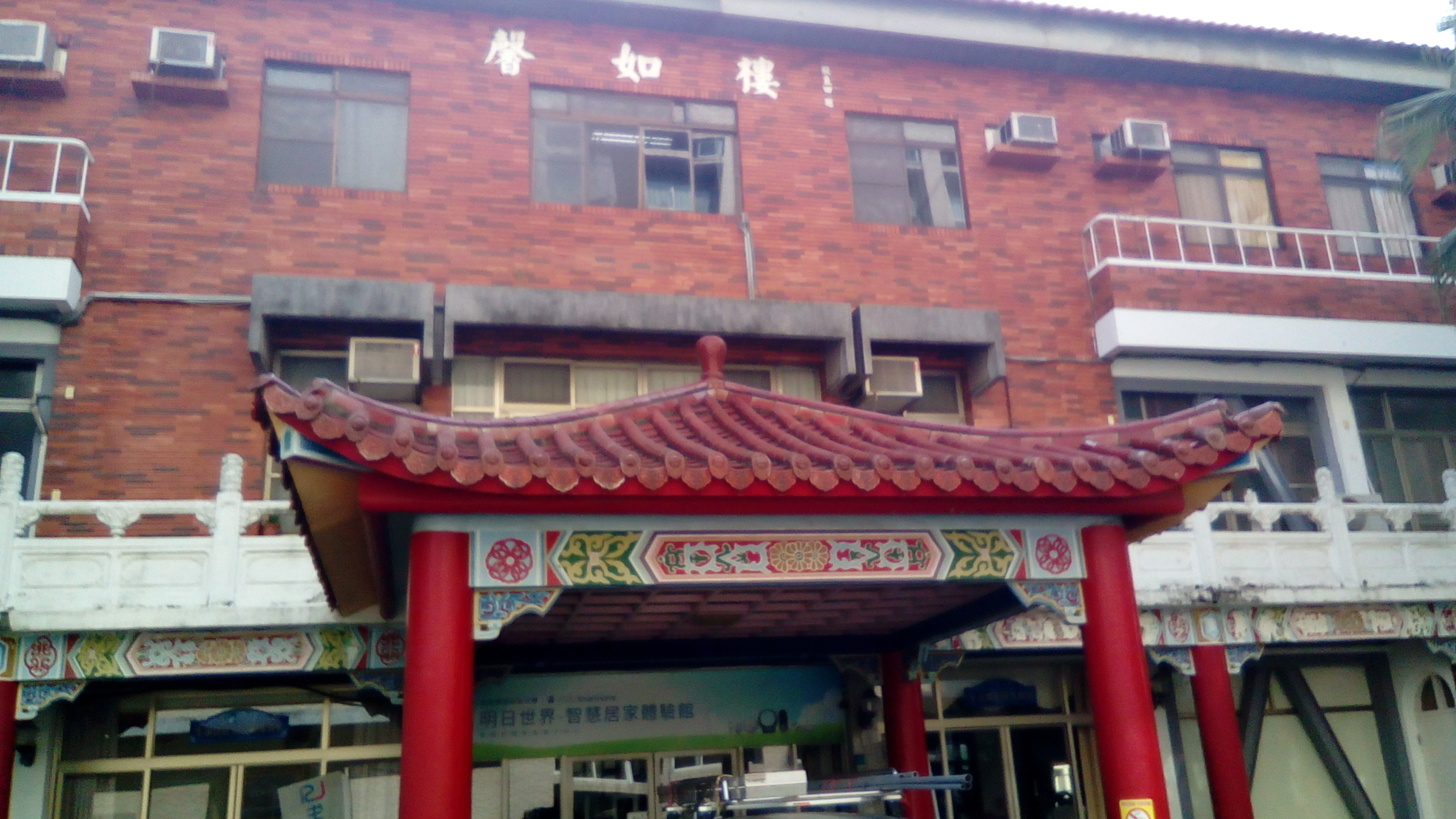 即生活服務產業系的禮儀教室